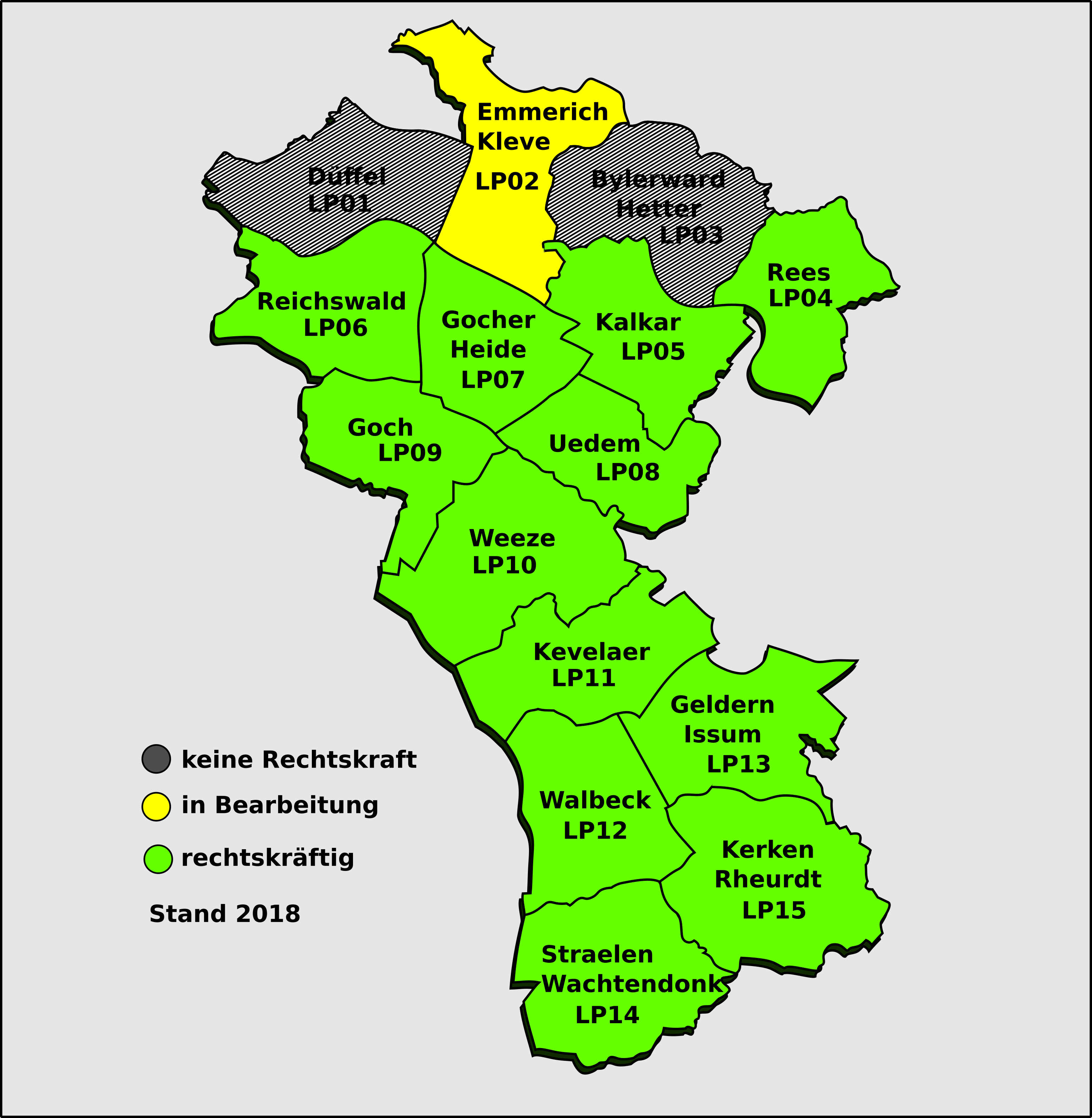 Aufteilung der Verwaltungsbezirke im Landschaftsplan Kreis Kleve, Stand 2018. Grün gekennzeichnete Bezirke haben einen LP. Der gelb markierte Bereich Emmerich-Kleve befindet sich in Bearbeitung. Für die grau schraffierten Bezirke gibt es noch keinen rechtskräftigen LP.